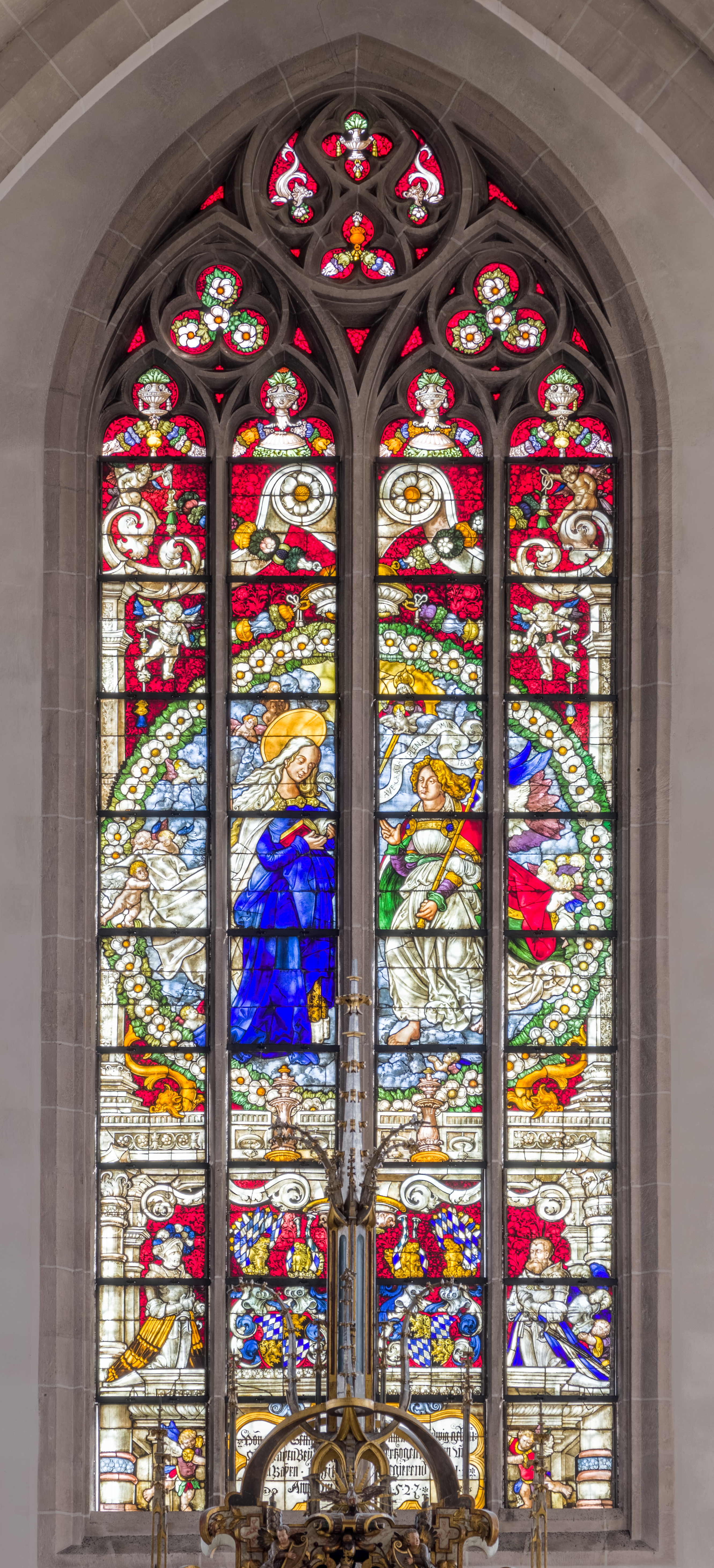 Fenster hinter dem Hochaltar im Münster Zur Schönen Unserer Lieben Frau in Ingolstadt/Donau